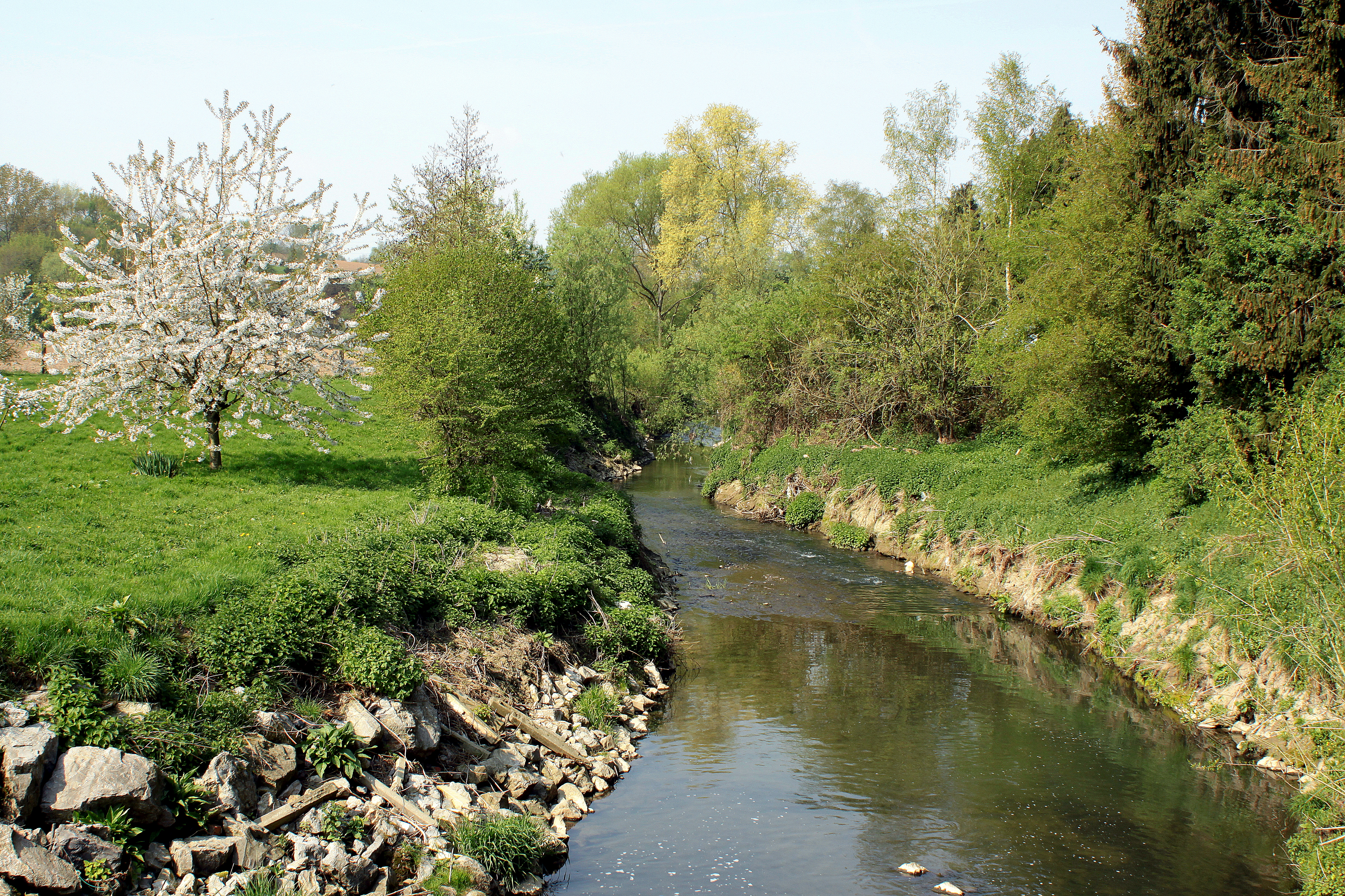 La Samme au lieu-dit Gratière